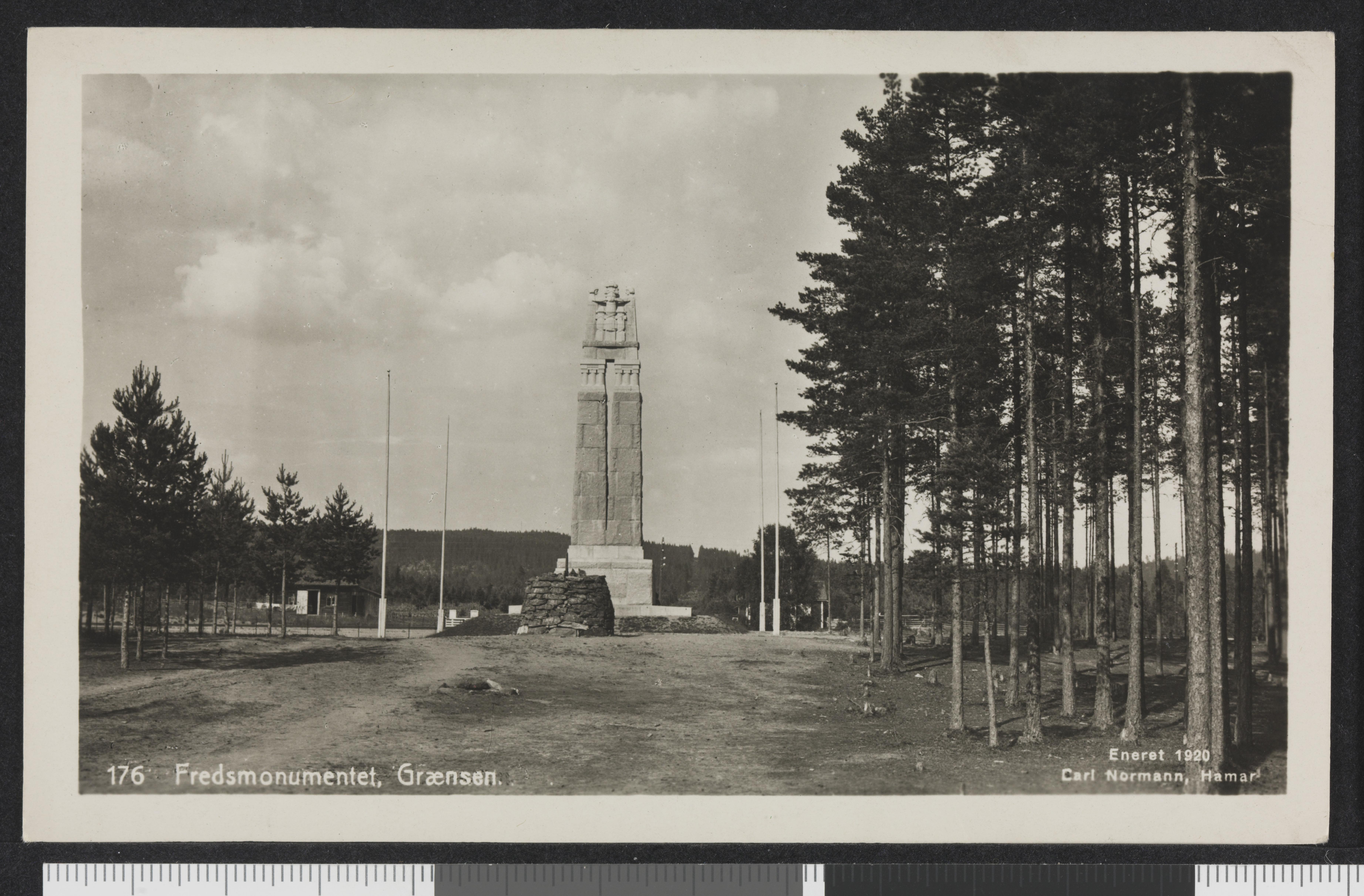 Bildet er hentet fra Nasjonalbibliotekets bildesamling Fredsmonumentet,Magnor, Eidskog, Hedmark